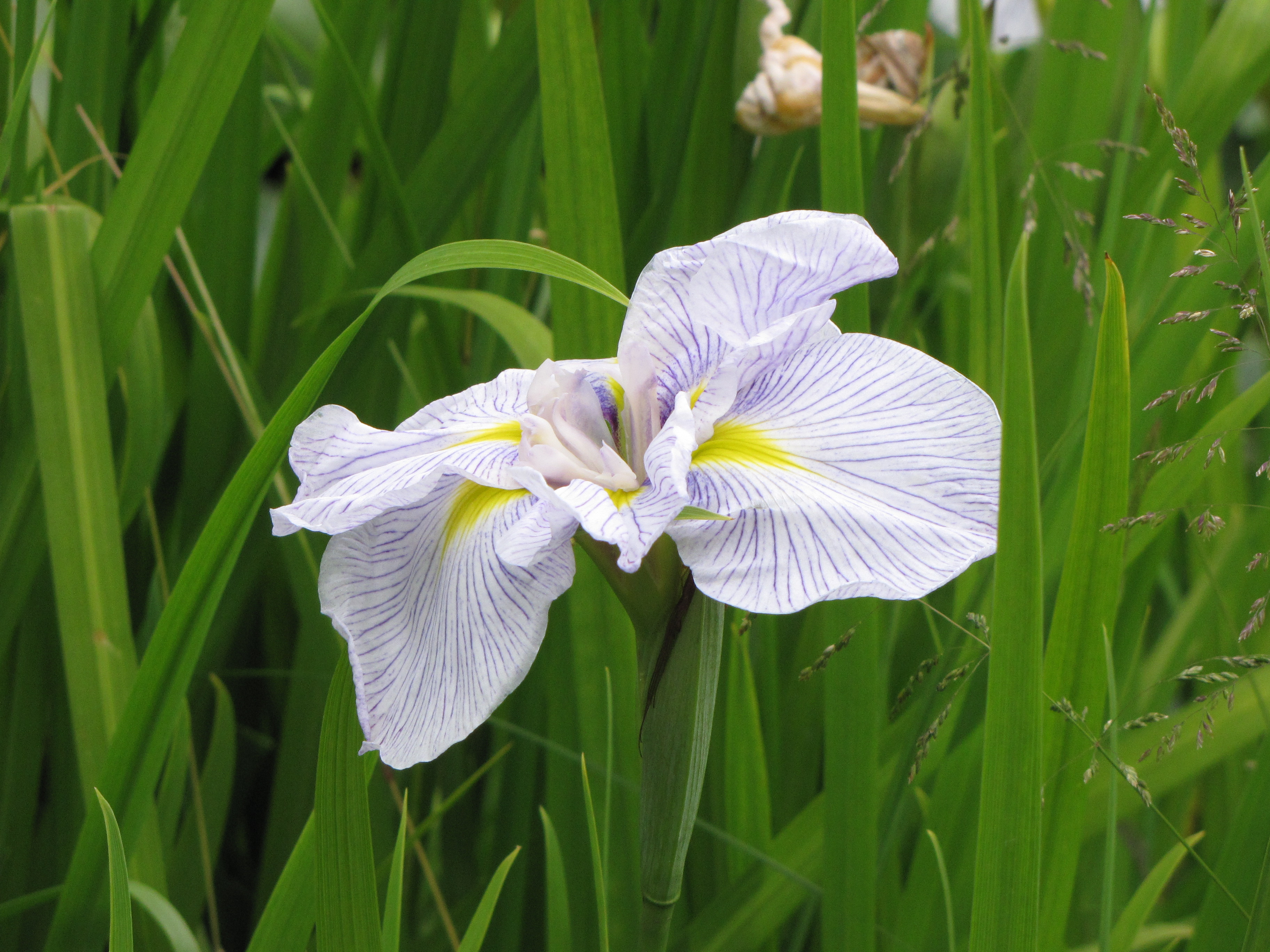 Iris blanc